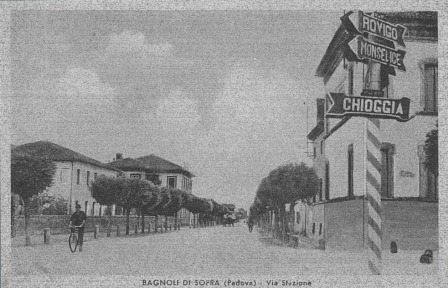 Bagnoli di Sopra, strada della stazione